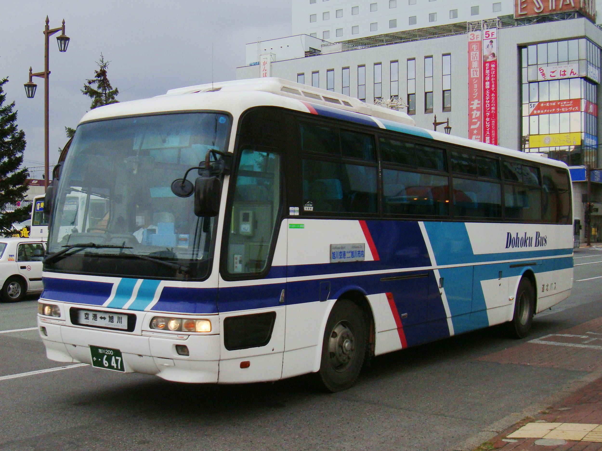 Asahikawa to Asahikawa Airport